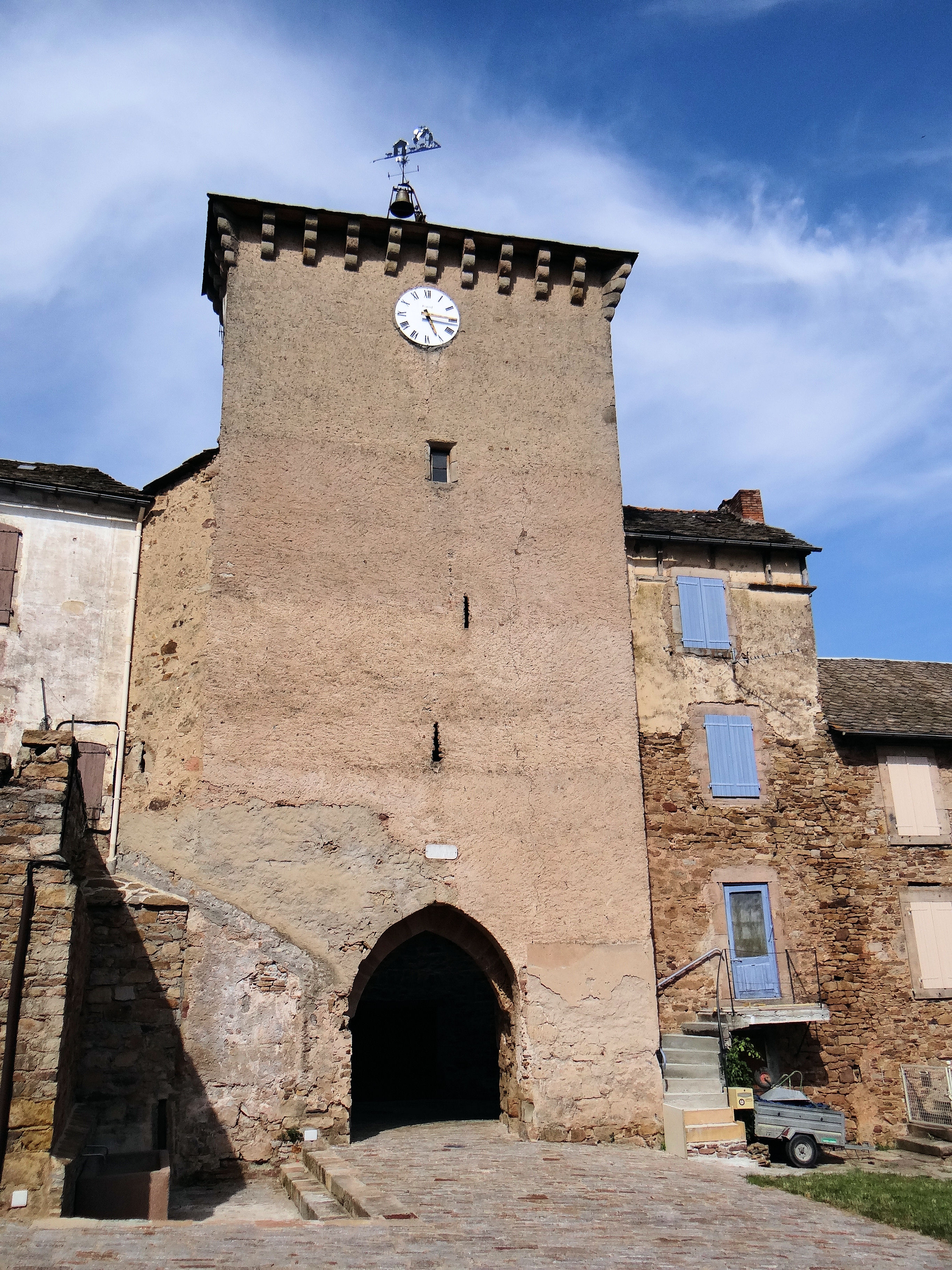 Viala-du-Tarn - Porte de l'Horloge côté campagne